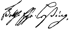 Gotthold Ephraim Lessing, Autograph, Unterschrift